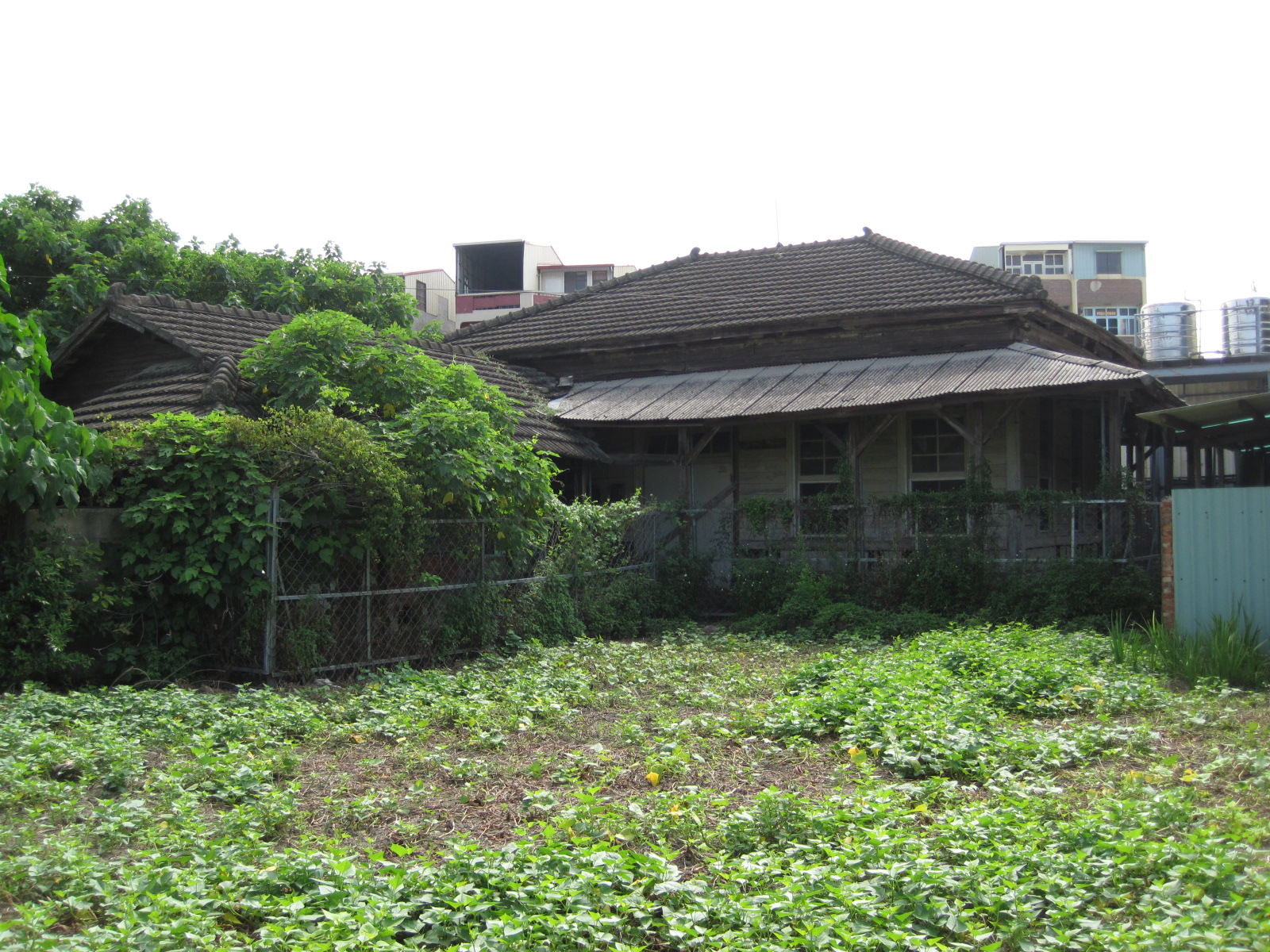 台灣總督府專賣局台南支局鹽埕分室。此圖為從該建築後方拍攝。